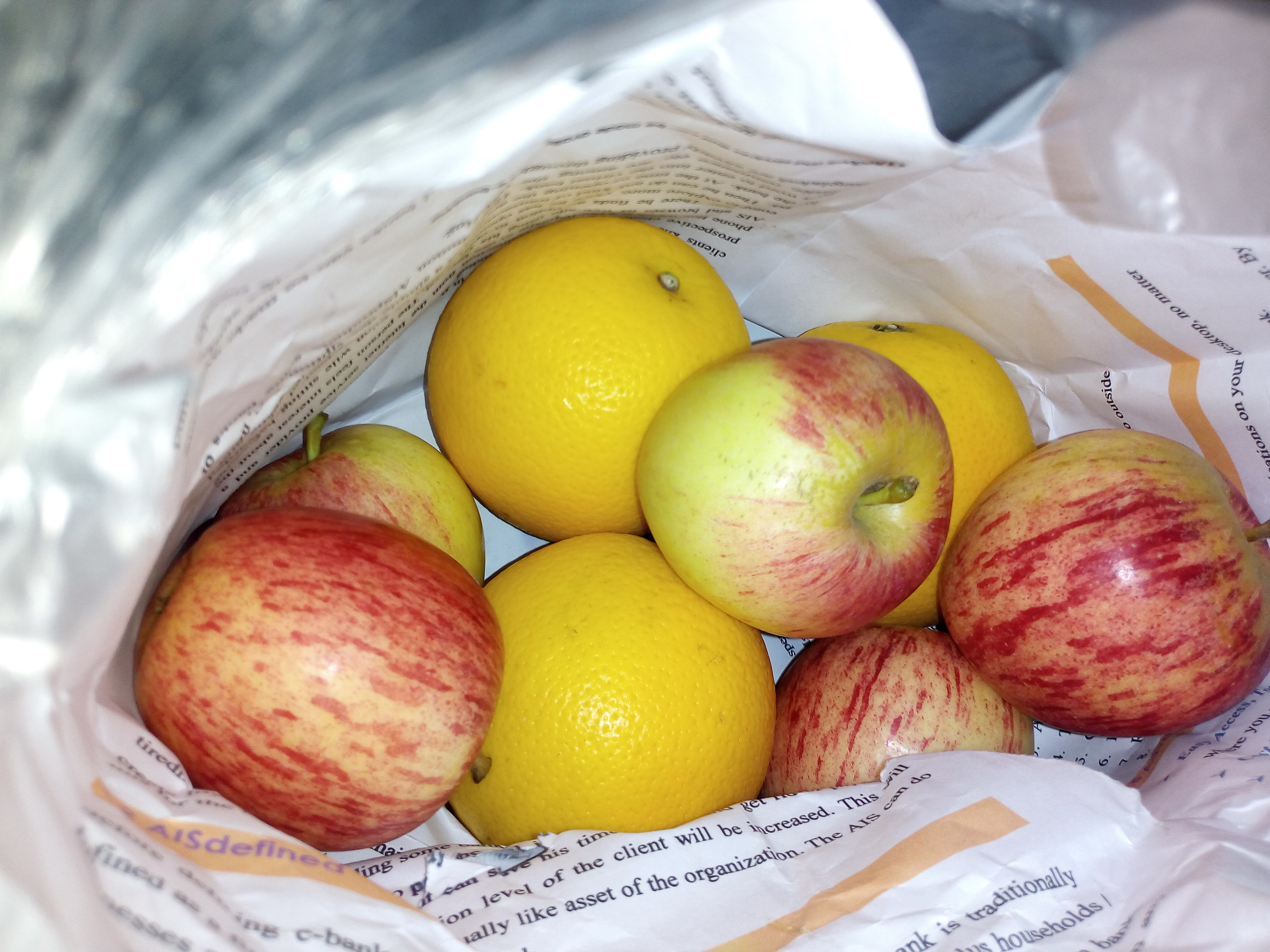 ক্রেতার কাছে কাগজের ঠোঙ্গায় আপেল,লেবু